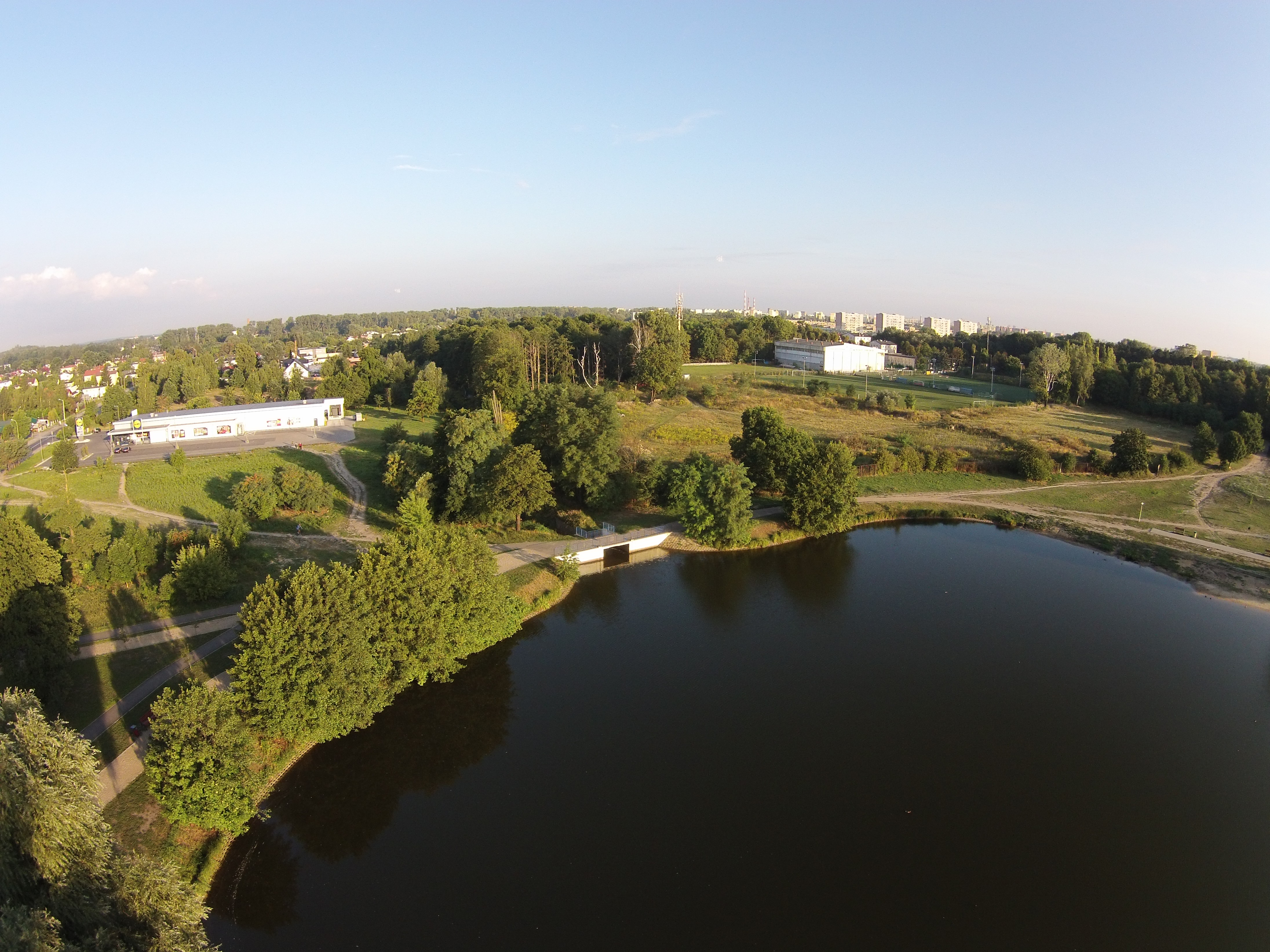 Przelot dronem nad stawami Jana w Łodzi